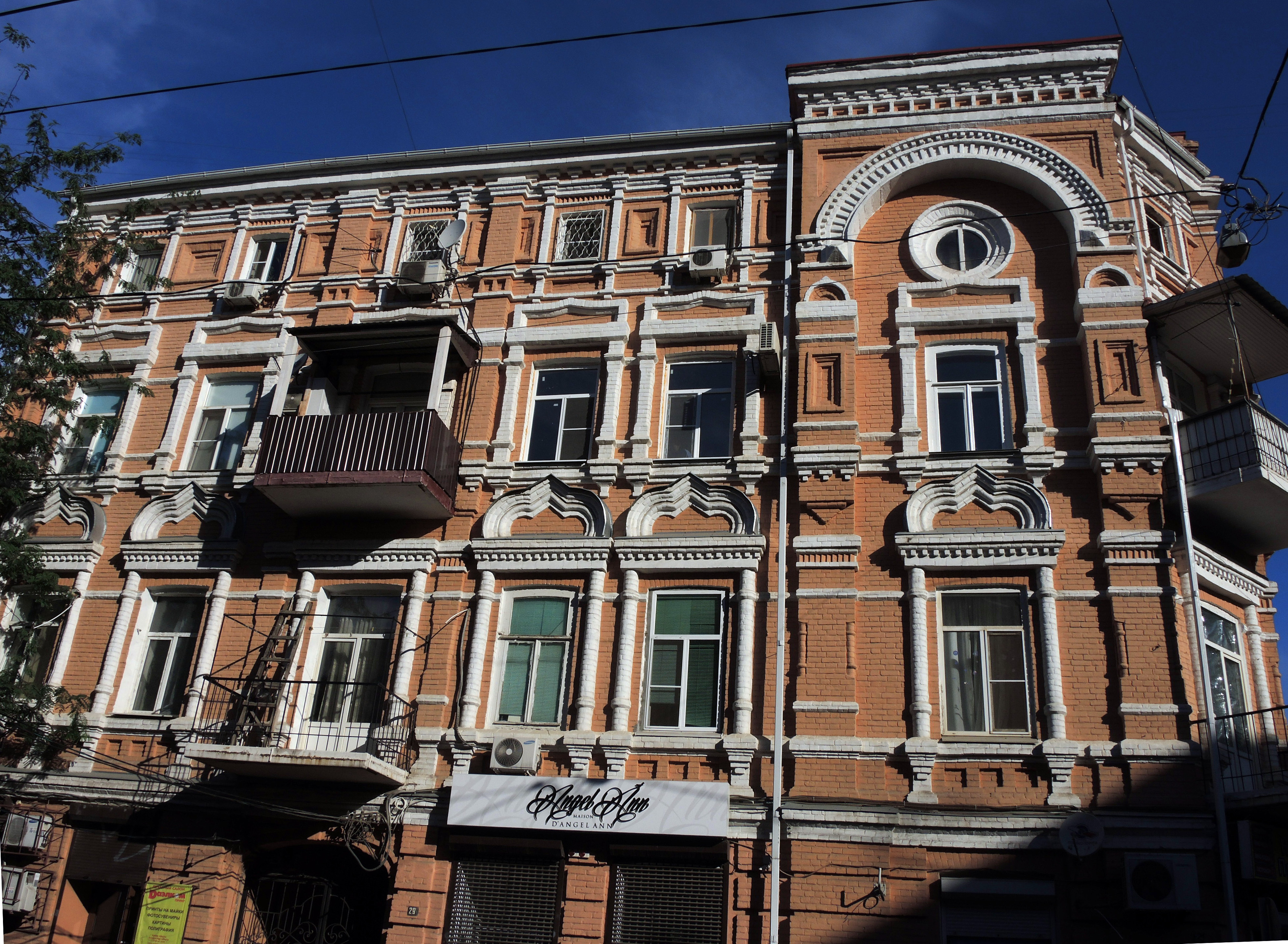 Доходный дом Е.Я. Костина: улица Суворова, 29/37, р. Чехова, литер А, Ростов-на-Дону, Ростовская область